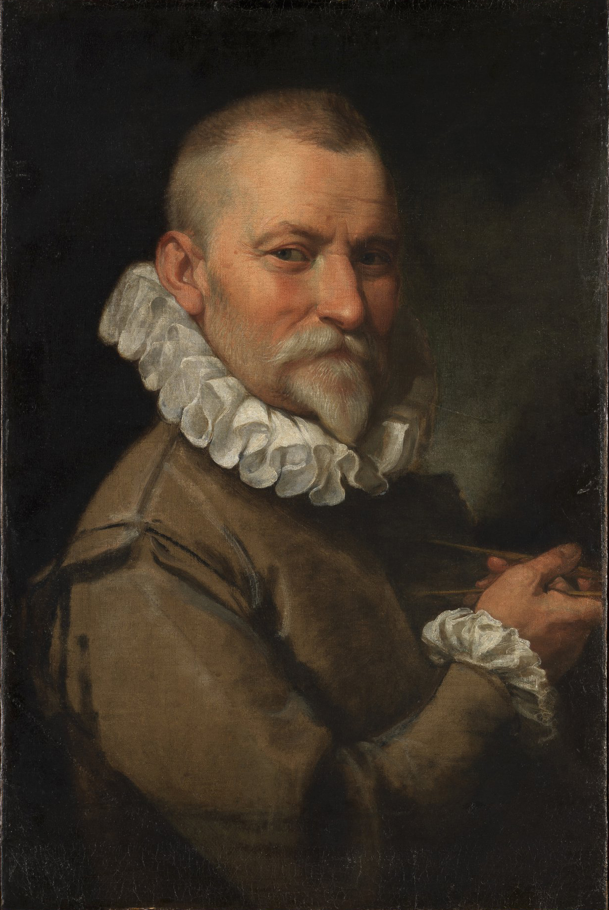 L'architetto italiano Domenico Fontana (1543-1607)